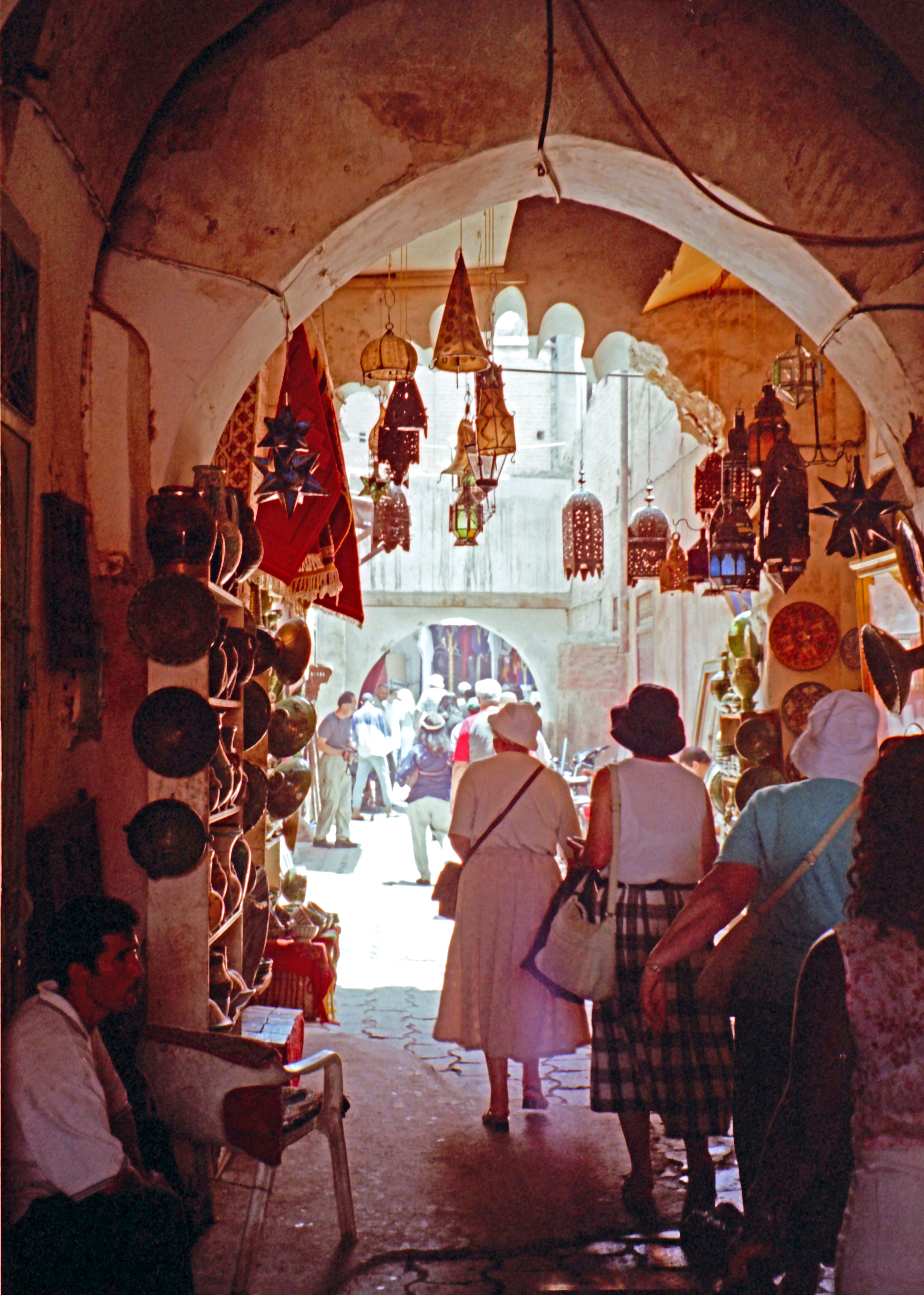 Morocco-76